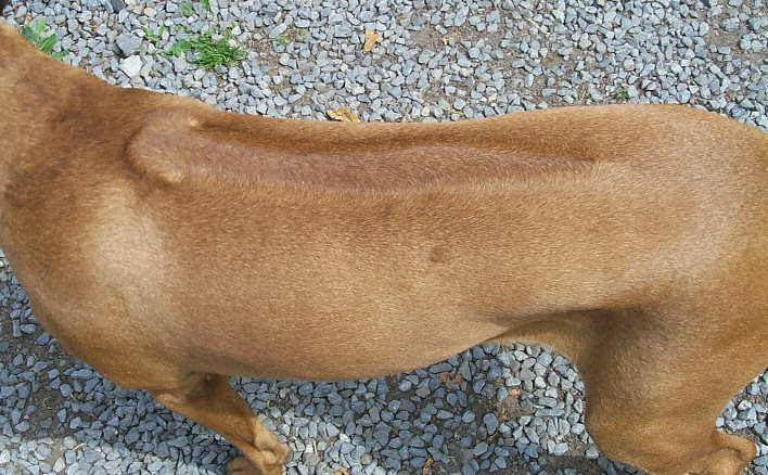 Ridge. Foto: Steffen Heinz (caronna)